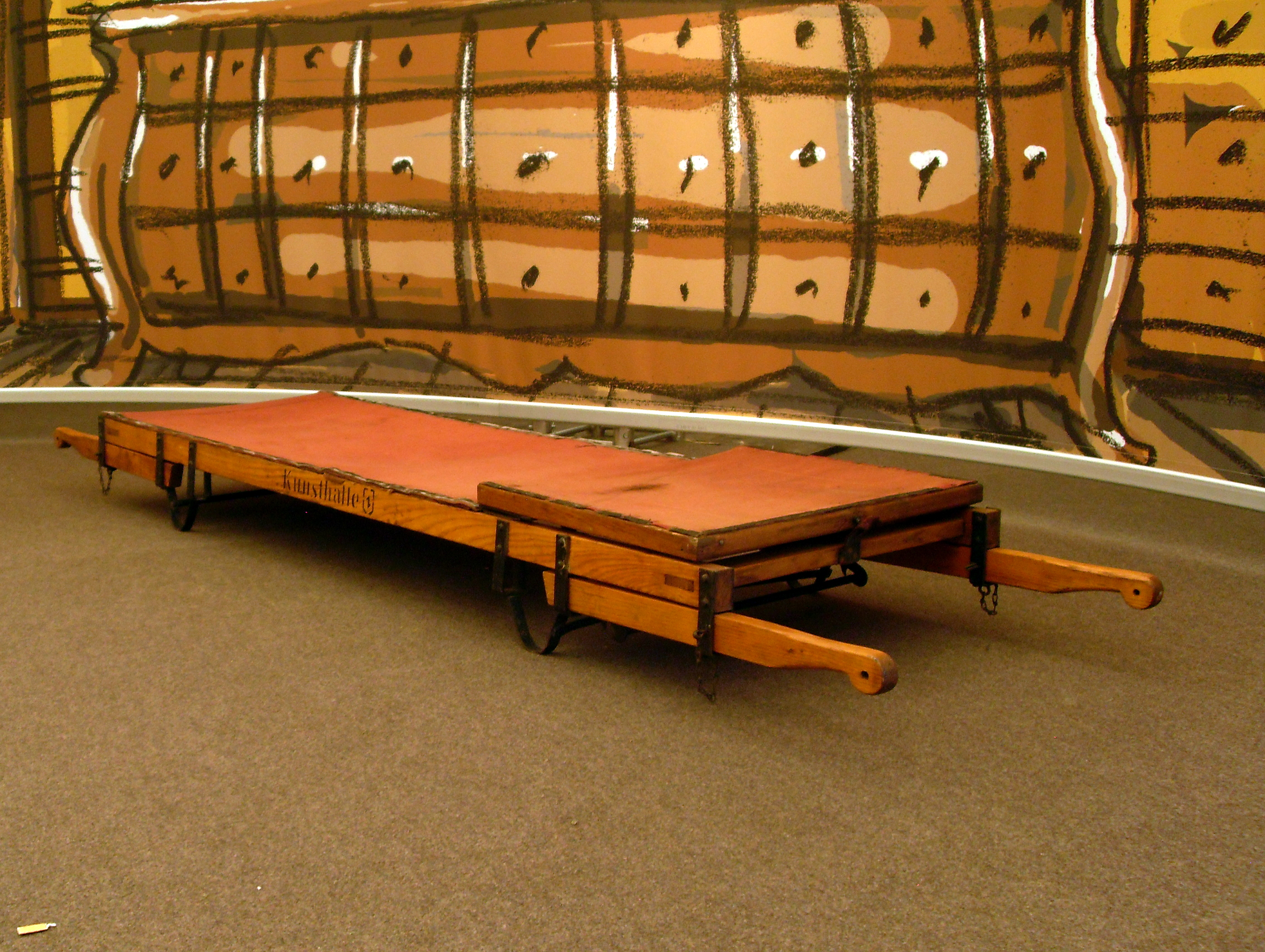 Nosze z połowy XX wieku